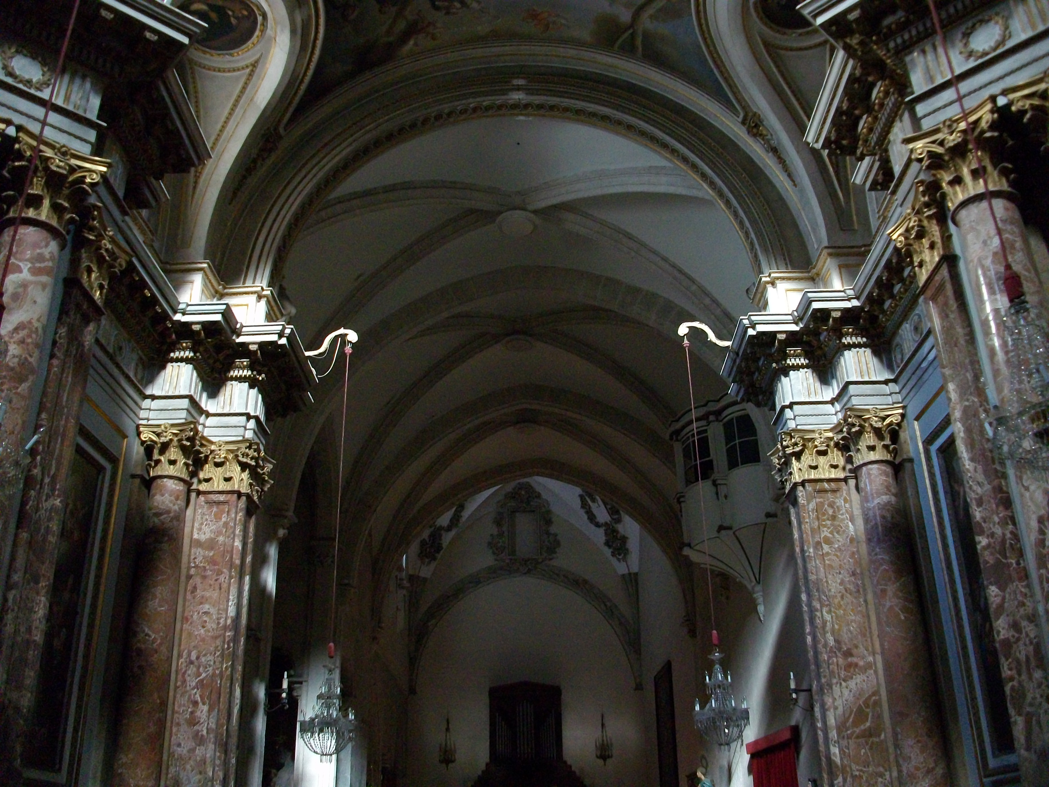 Vista cap als peus de la capella de Sant Vicent Ferrer del Convent de Sant Doménec o sant Domingo de València.